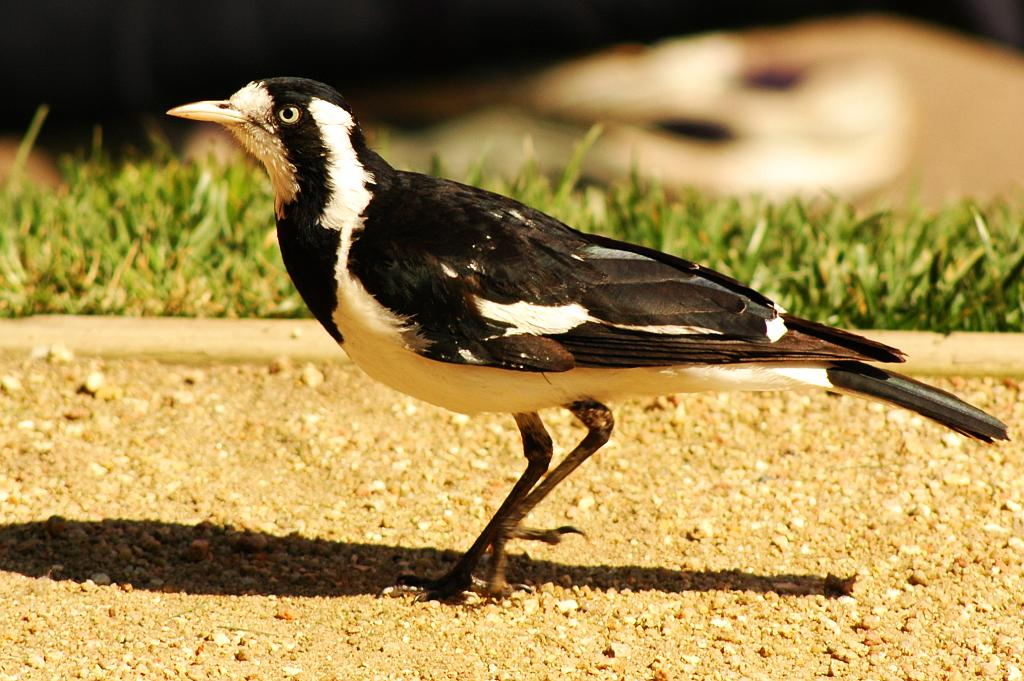 Magpie Lark (Grallina cyanoleuca)